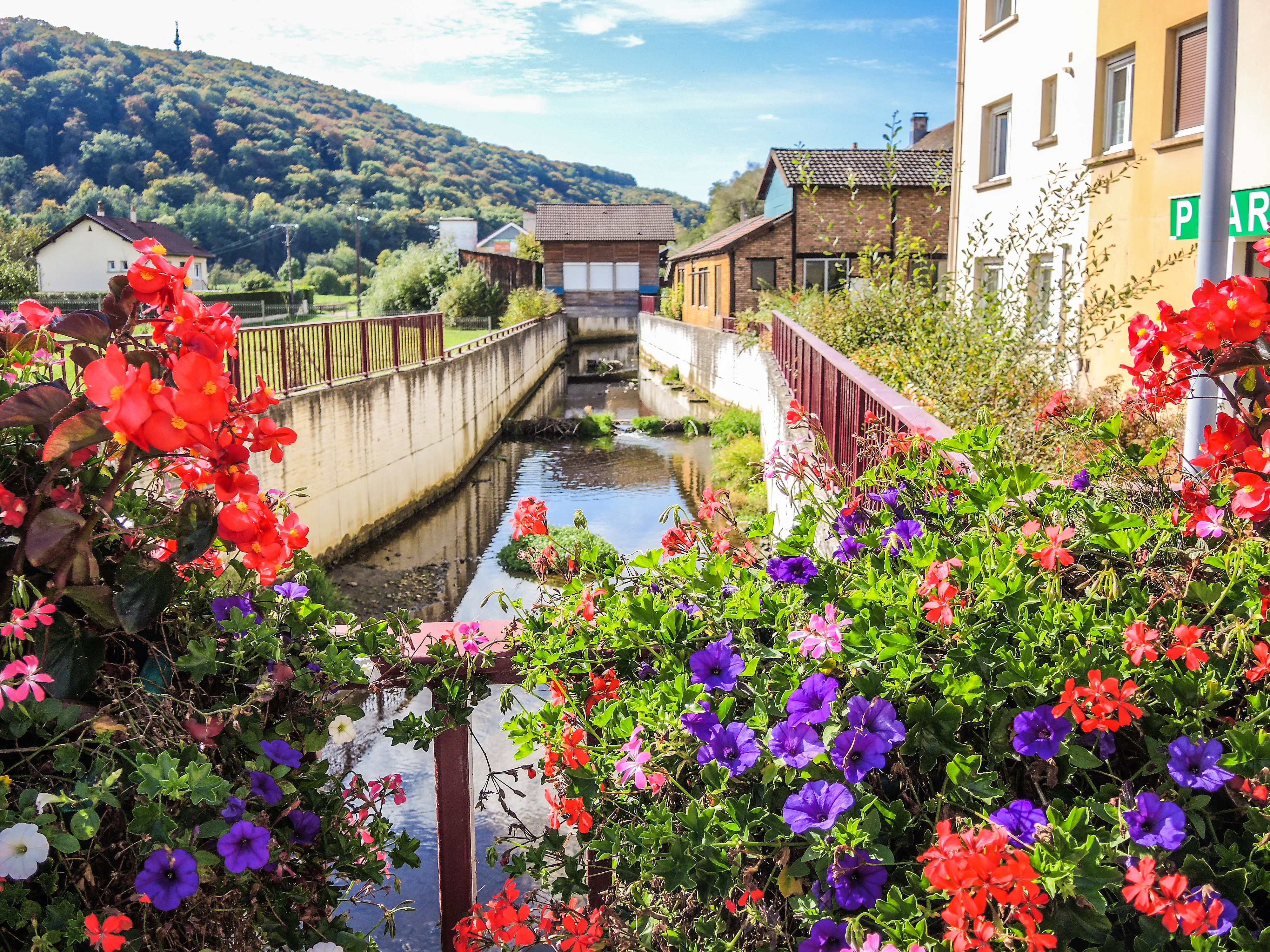 Le ruisseau, le Rupt, traverse le village de Bart. Doubs